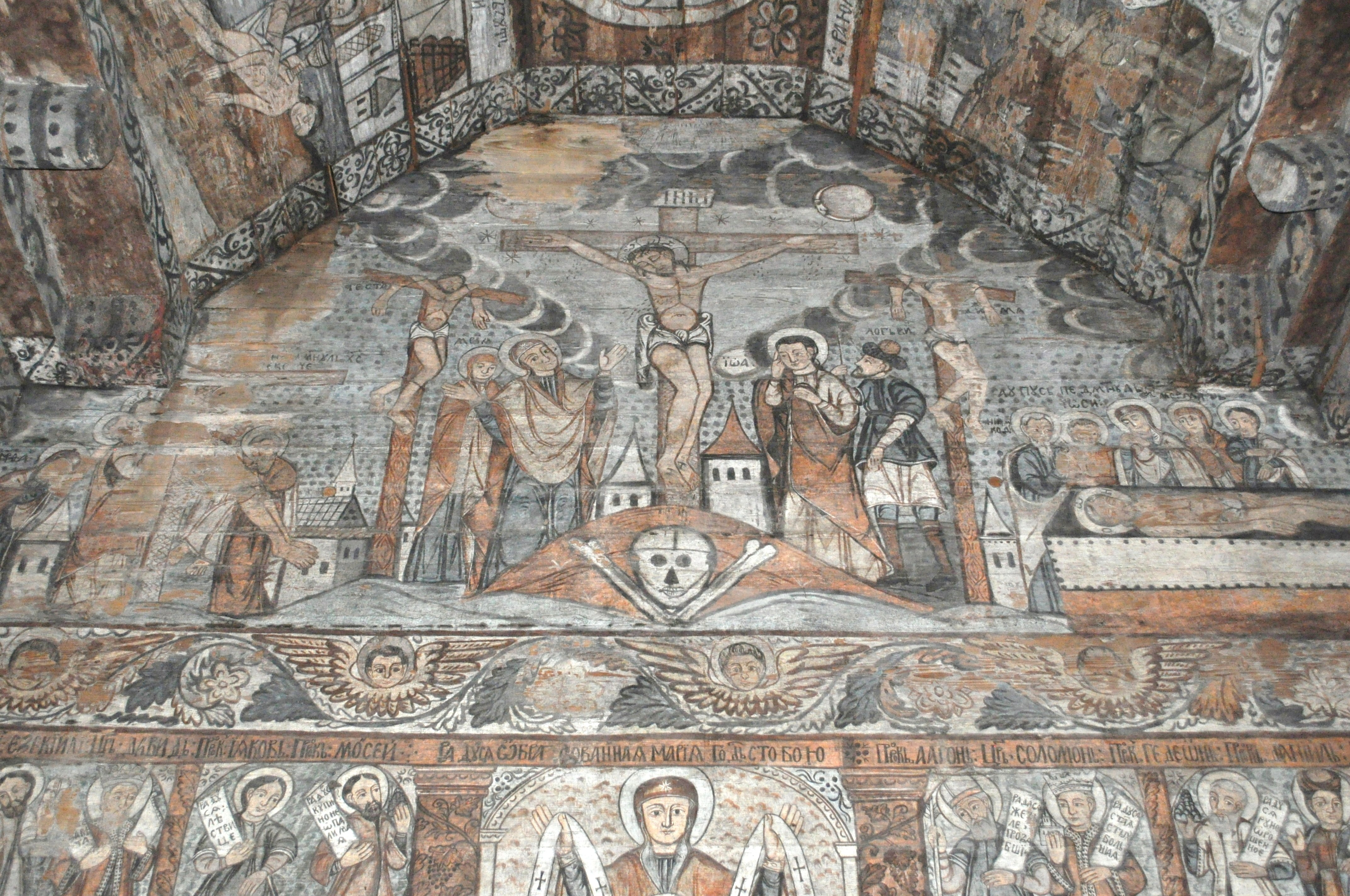 Biserica de lemn "Naşterea Maicii Domnului", sat IEUD